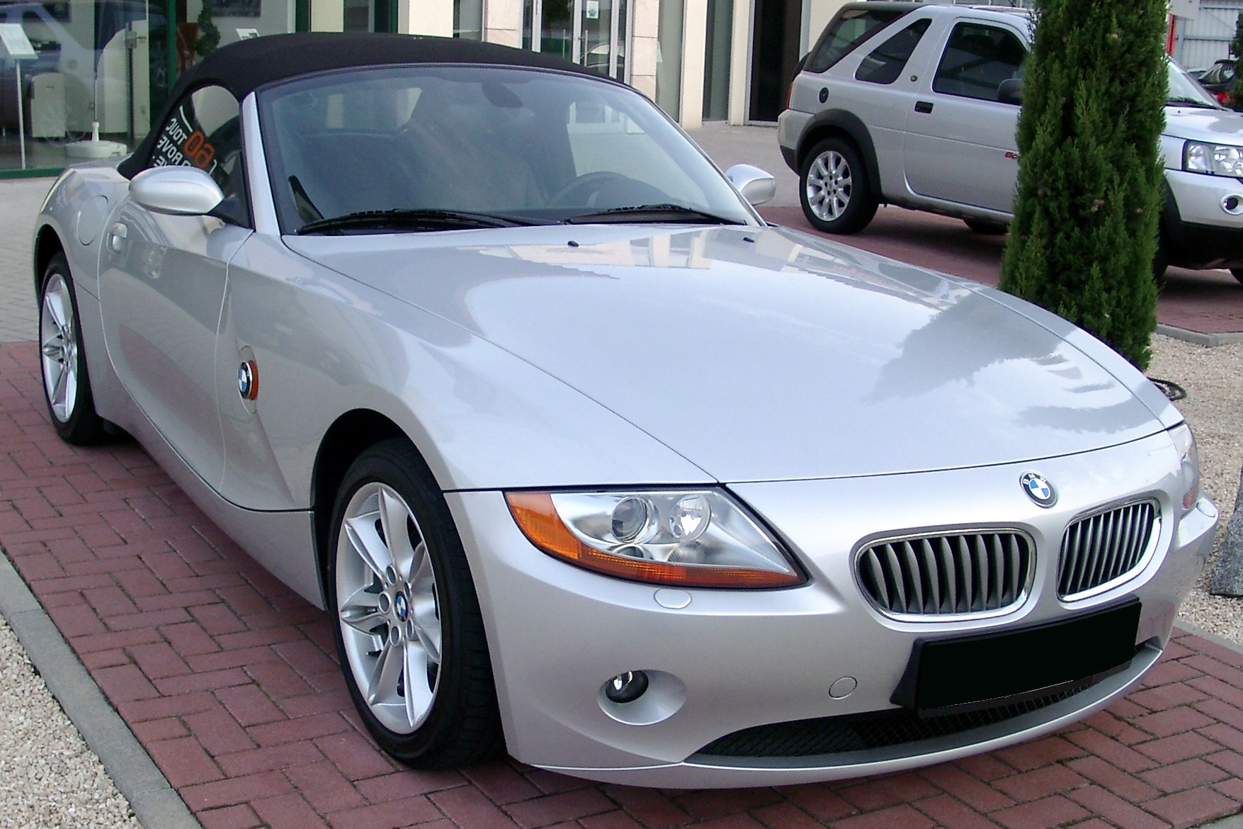 BMW Z4 Convertible